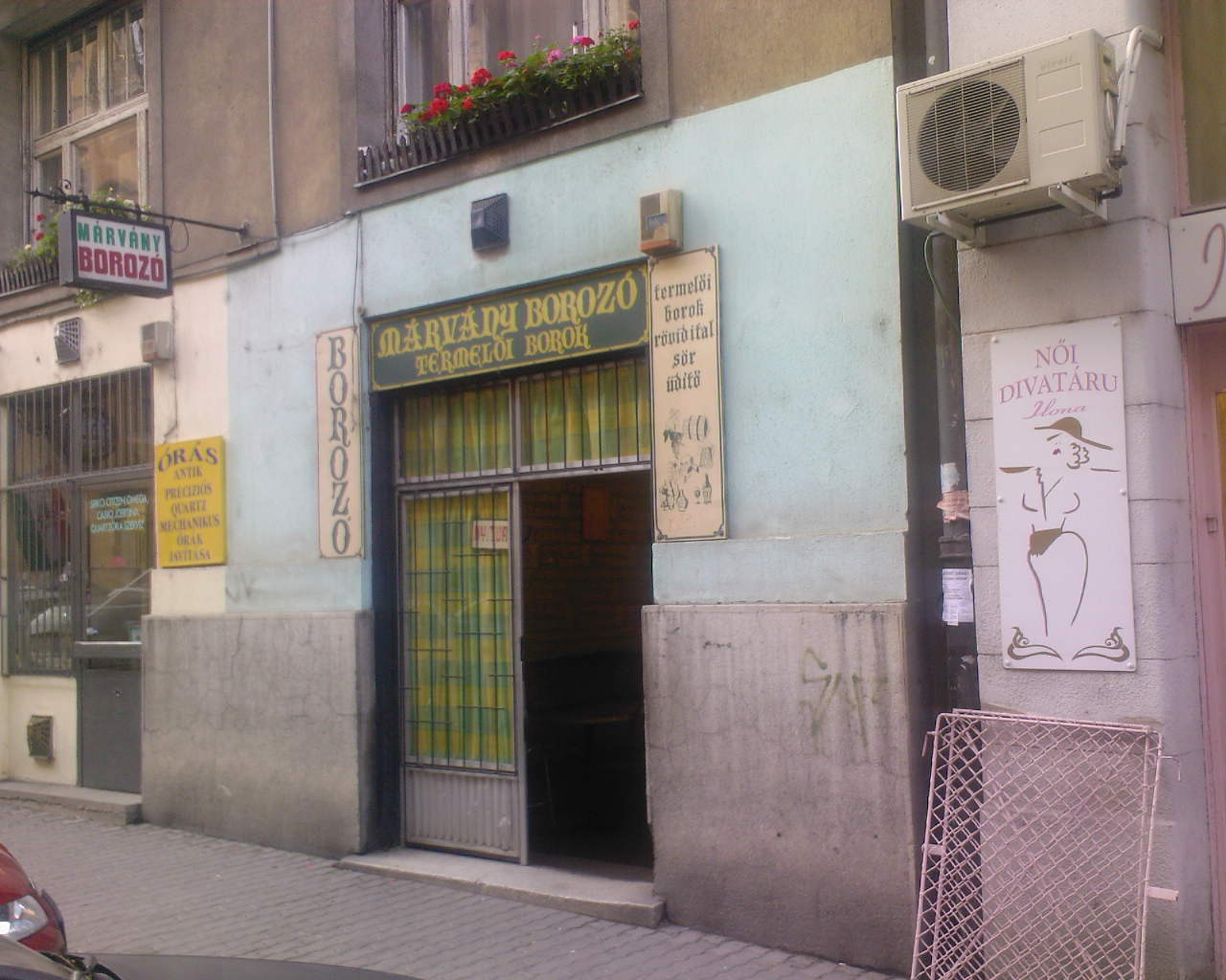 Tersánszky Józsi Jenő kedvenc borozója a Márvány utca 27-ben, Budapesten